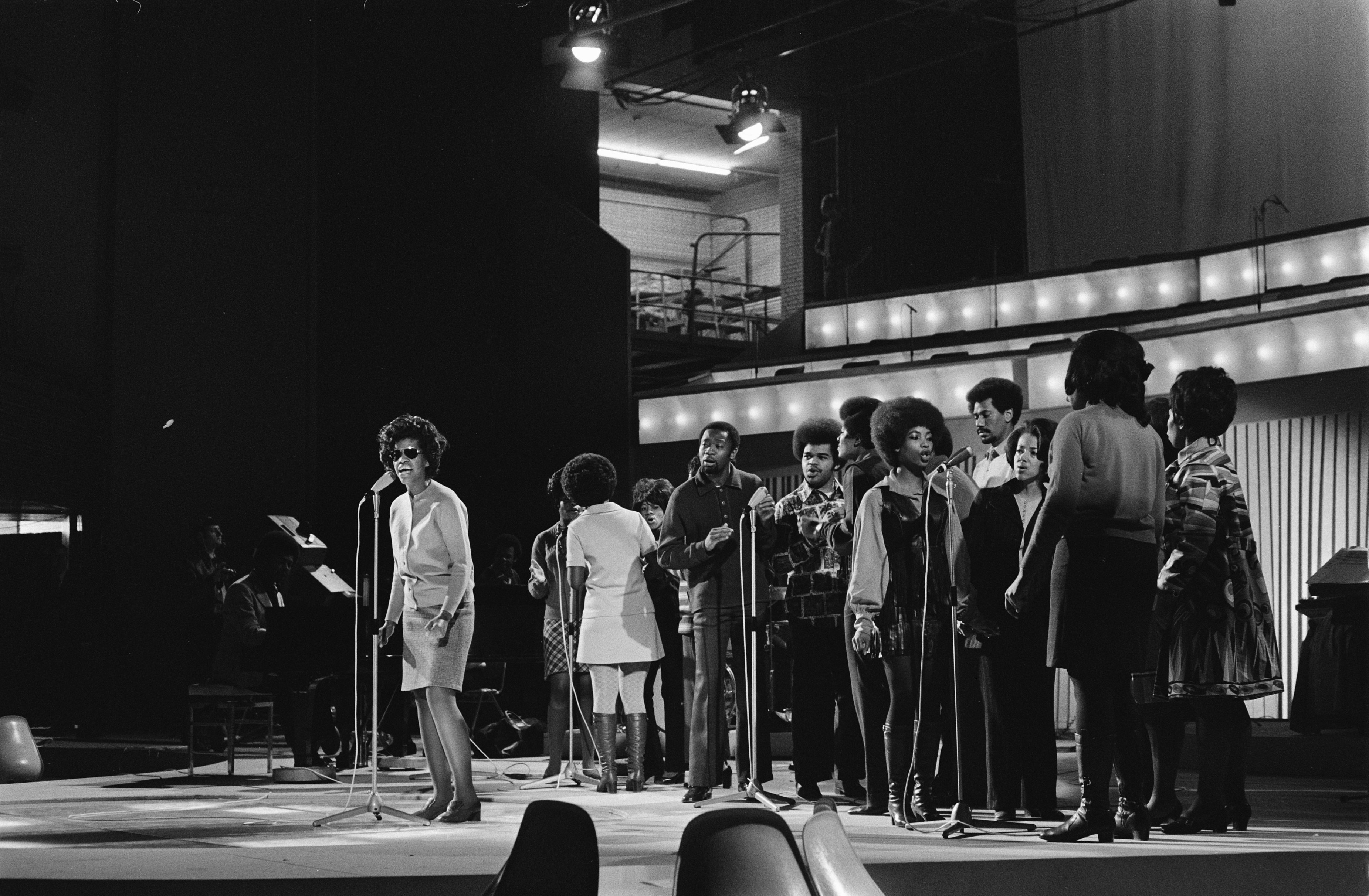 Collectie / Archief : Fotocollectie Anefo Reportage / Serie : [ onbekend ] Beschrijving : Grand Gala du Disque in RAI Amsterdam. Repetities. Edwin Hawkins Singers Datum : 26 februari 1970 Locatie : Amsterdam, Noord-Holland Trefwoorden : REPETITIES Persoonsnaam : Edwin Hawkins Singers Instellingsnaam : RAI Fotograaf : Mieremet, Rob / Anefo Auteursrechthebbende : Nationaal Archief Materiaalsoort : Negatief (zwart/wit) Nummer archiefinventaris : bekijk toegang 2.24.01.05 Bestanddeelnummer : 923-2984